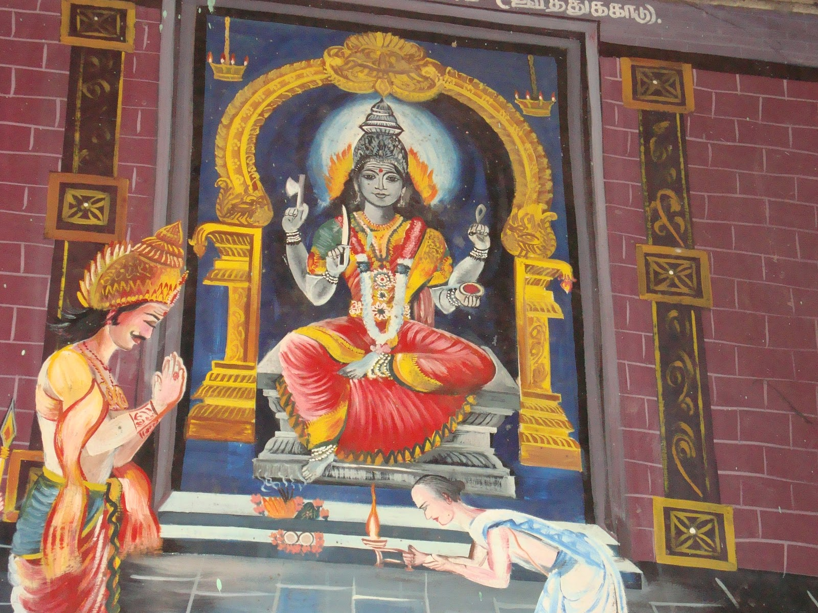 ஊத்துக்காடு எல்லம்மன் கோயில் ஓவியம்